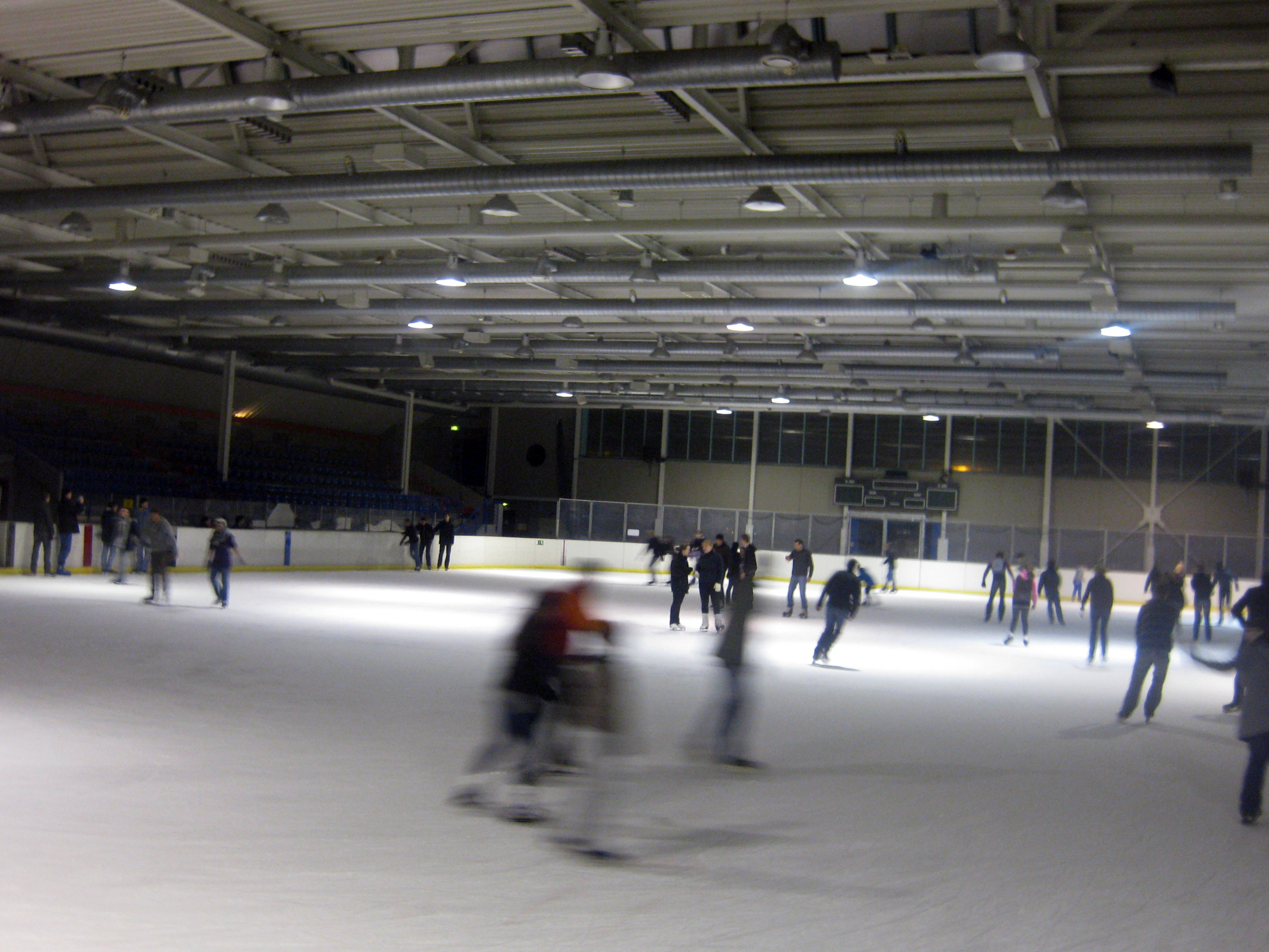 Eissporthalle Darmstadt